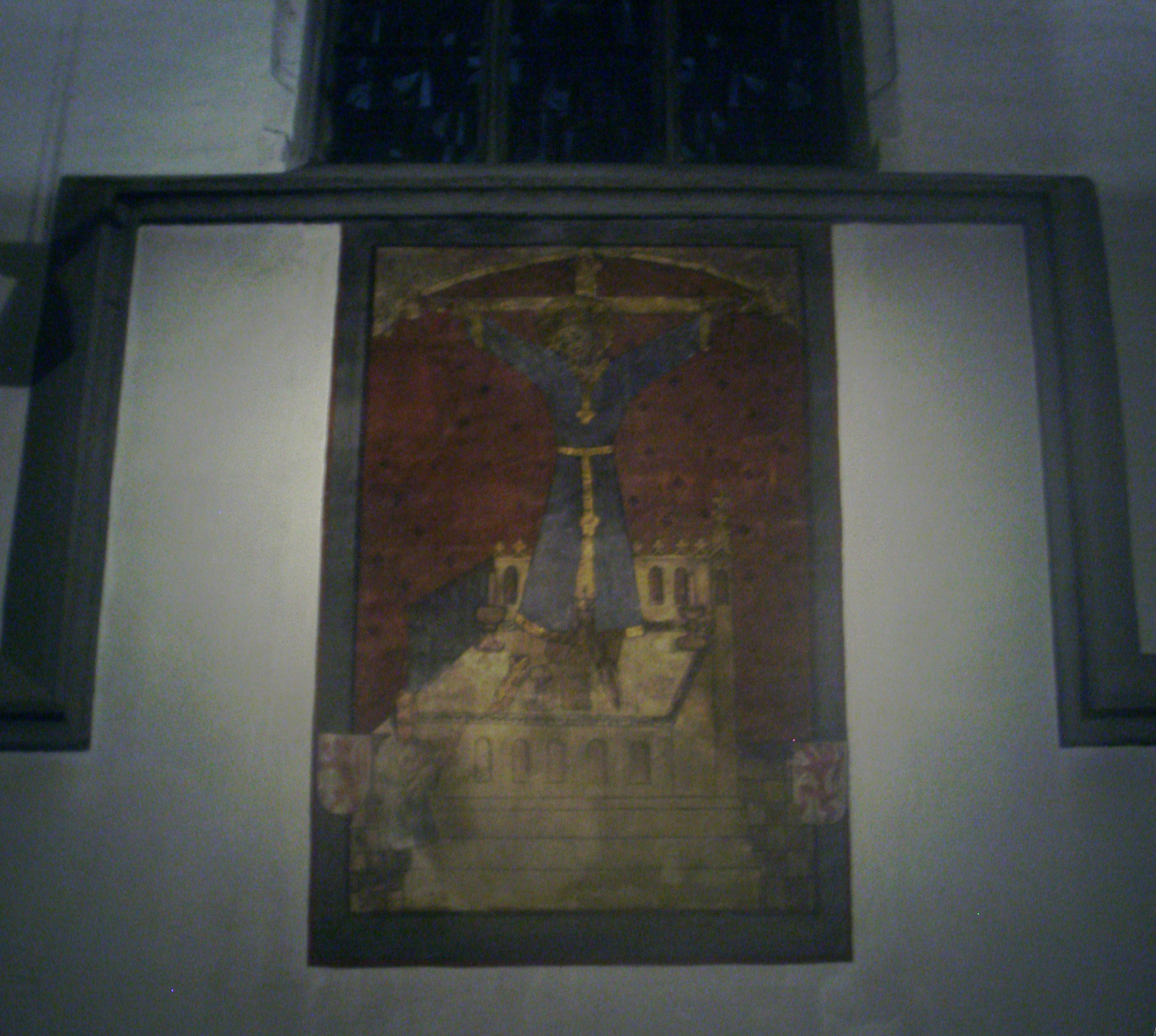 Lambertuskirche Düsseldorf, Kümmernisdarstellung - Nacht der Museen 2.4.2011